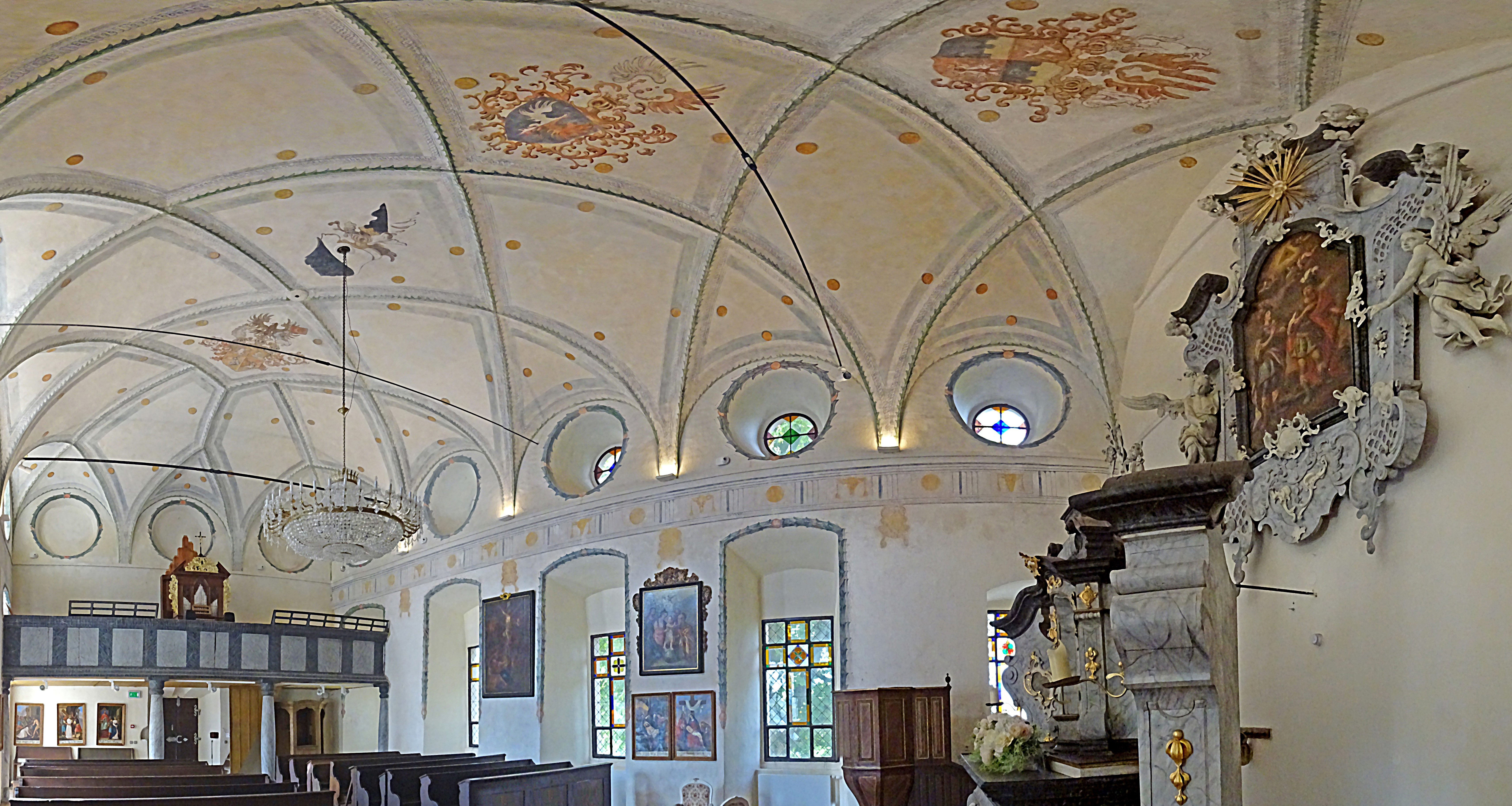 Panorama-Blick in die Große Kapelle von Schloss Svijany